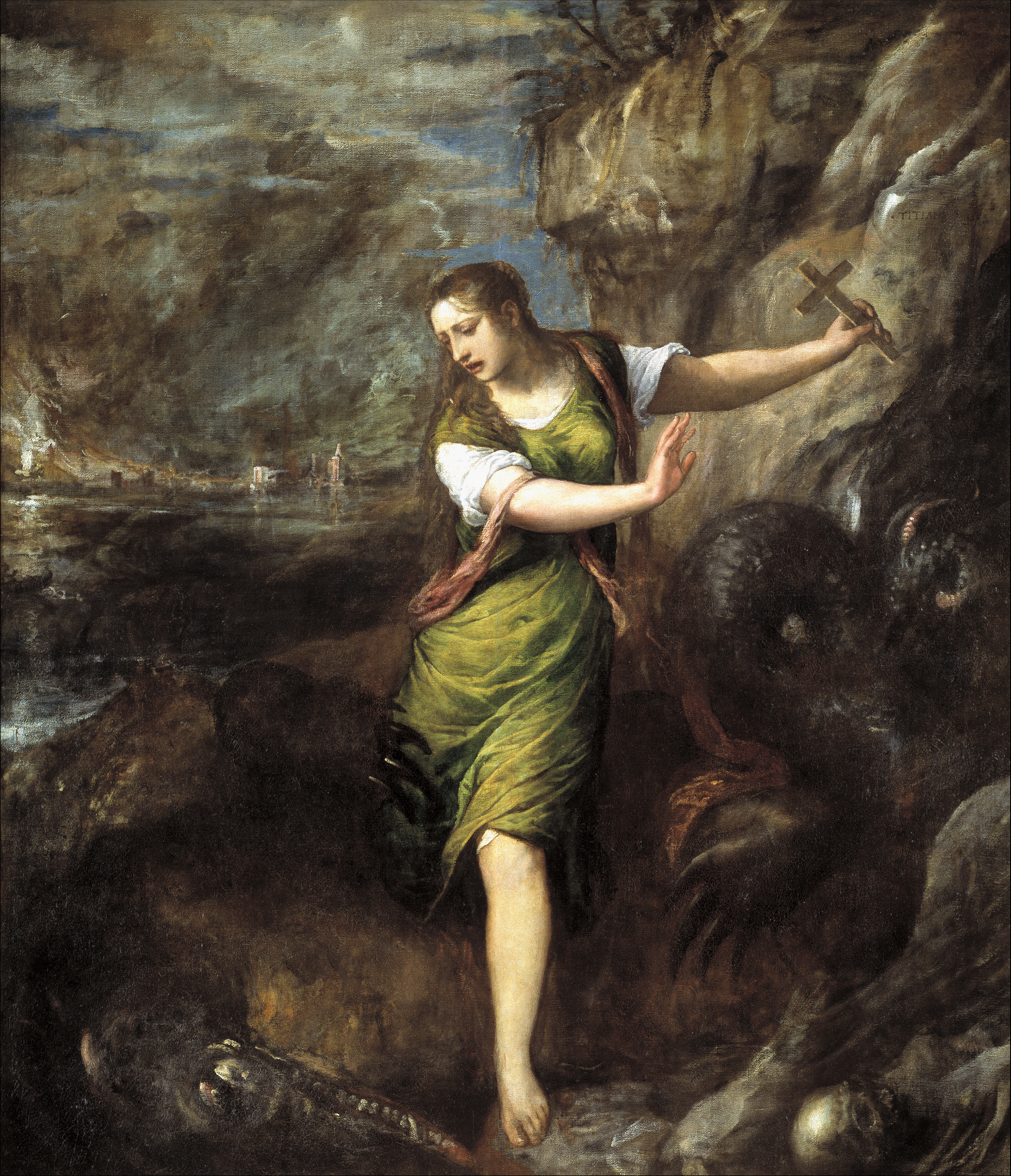 La obra representa a la virgen y mártir Santa Margarita de Antioquía, que murió por profesar el cristianismo.